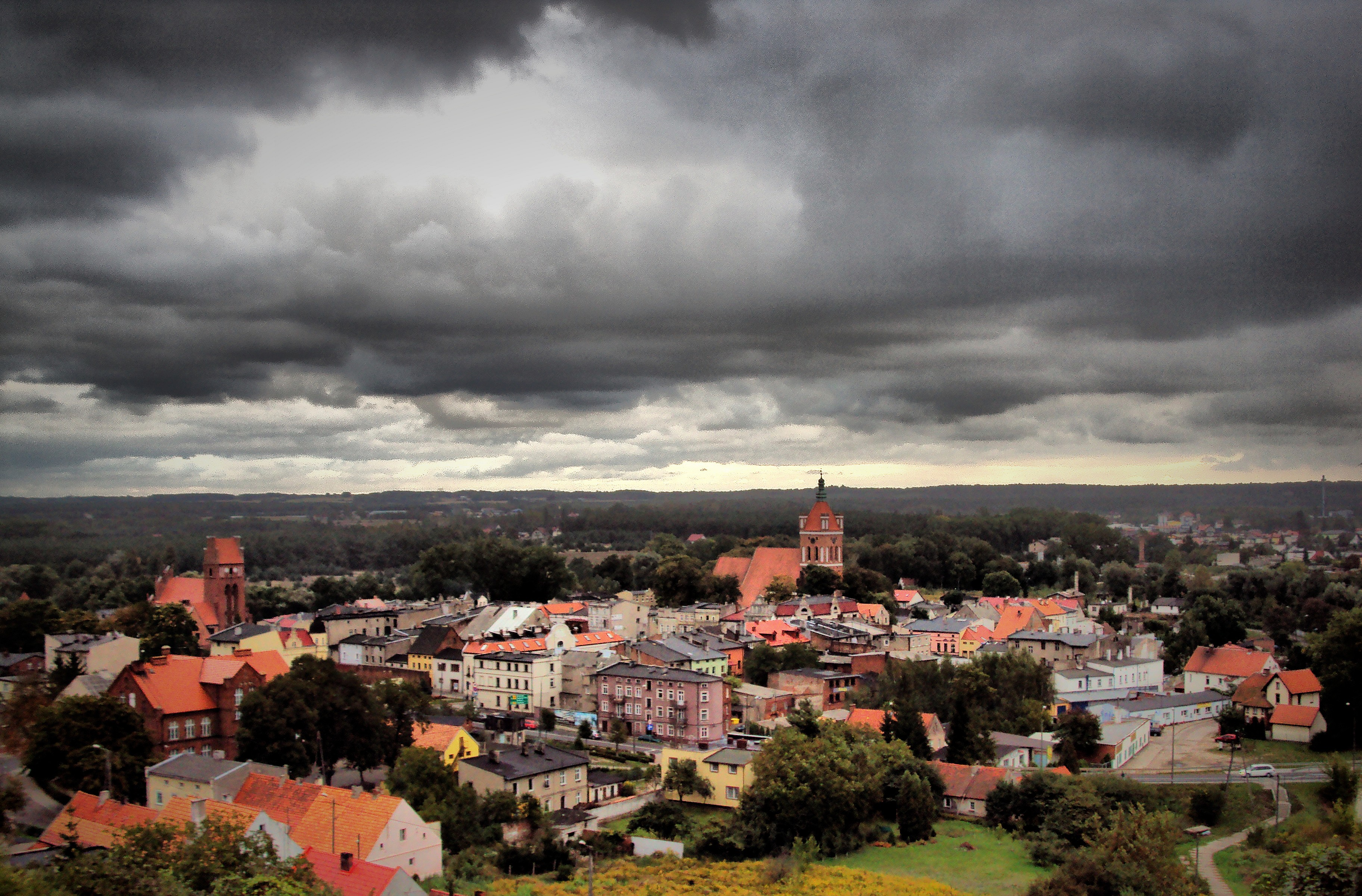 stare miasto w Golubiu, XIV w. Golub-Dobrzyń, Miasto Golub-Dobrzyń